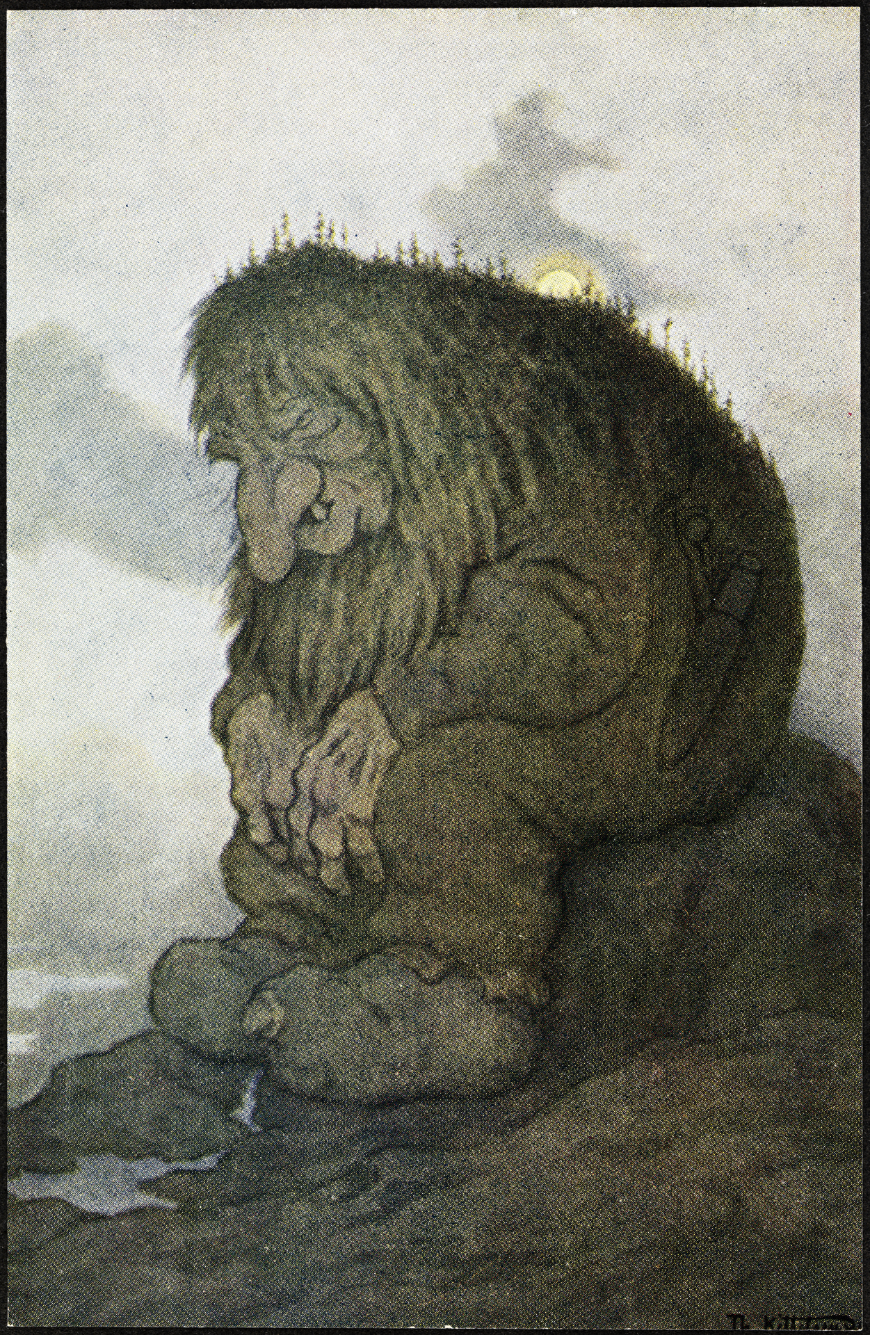 Tittel / Title: Trollet som grunner på hvor gammelt det er Motiv / Motif: Postkort. Dato / Date: malt i 1911 / painted in 1911 Kunstner / Artist: Theodor Kittelsen (1857-1914) Utgiver / Publisher: Mittet & Co. (nr 46) Eier / Owner Institution: Nasjonalbiblioteket / National Library of Norway Lenke / Link: Bildesignatur / Image Number: blds_04842